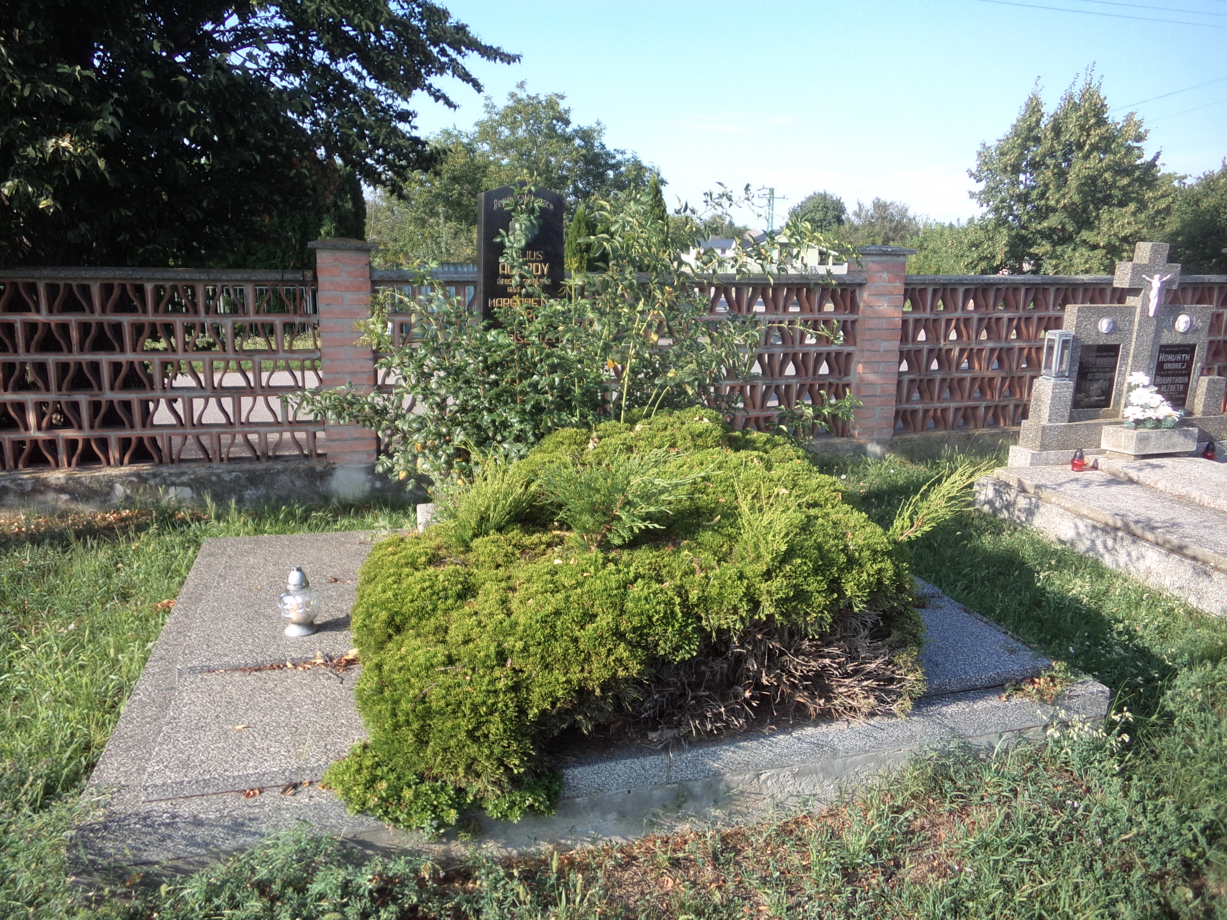 Agárdy Gyula és családja sírja Verebélyen 2019